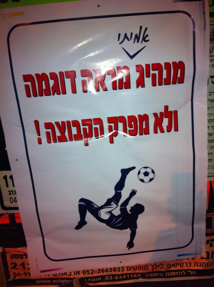 מודעות אוהדי עכו בזמן סכנת הפירוק